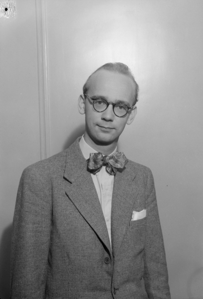 Jon O. Norbom formann i Unge Venstre